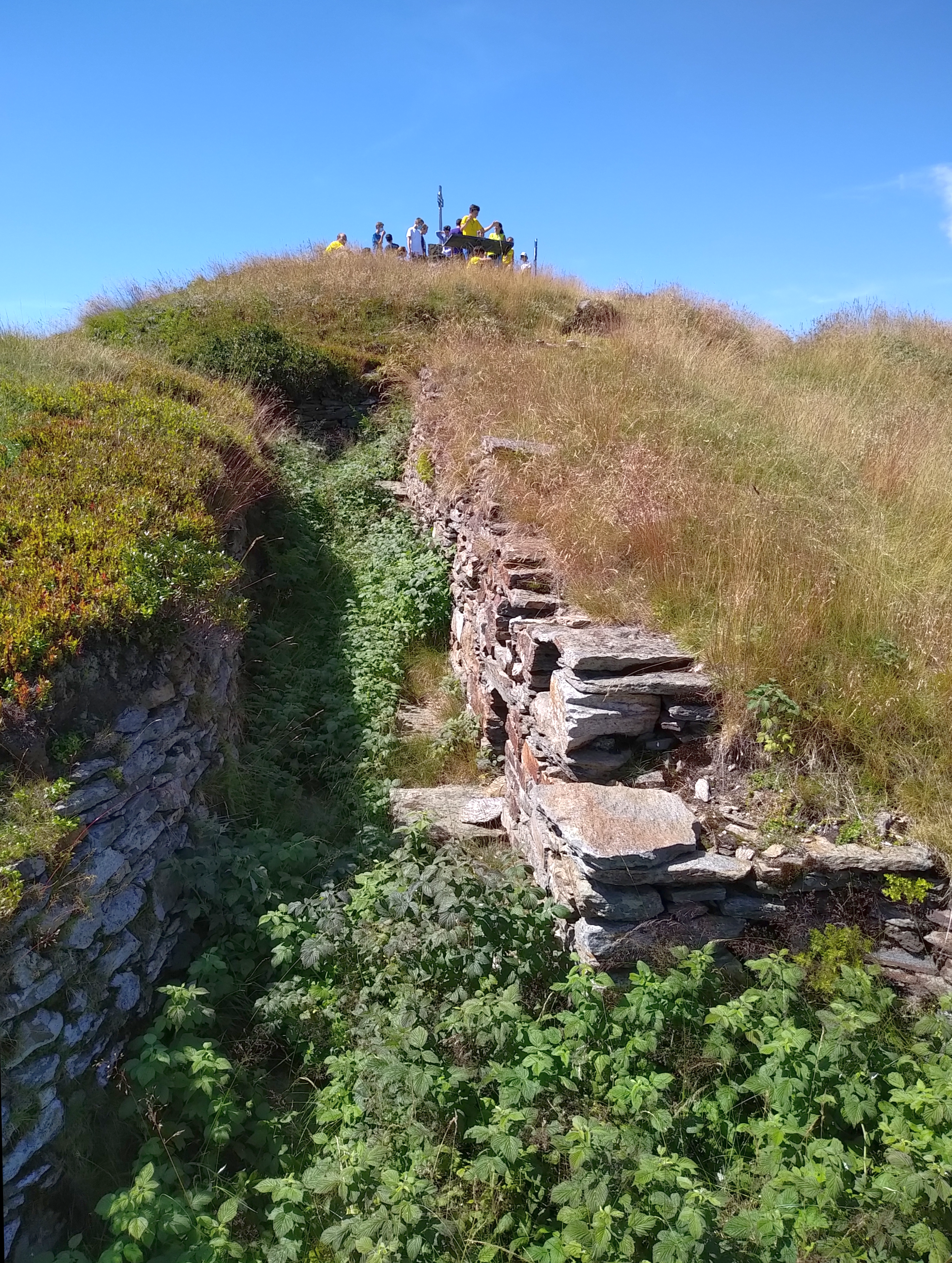 Monte Spalavera (Alpi Lepontine): vecchie trincee della c.d. "Linea Cadorna" presso la cima della montagna